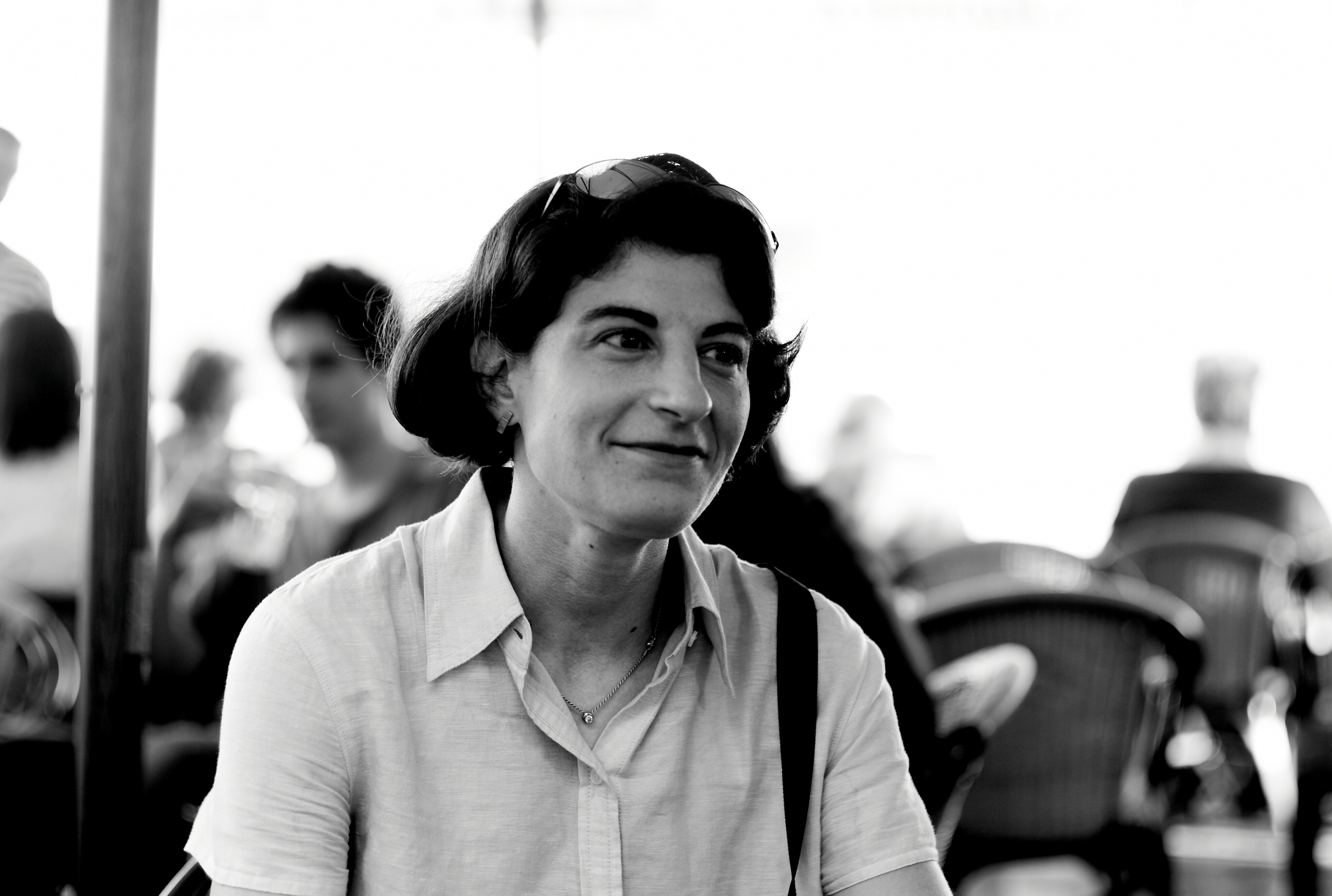 Wendy Seltzer at ISummit07